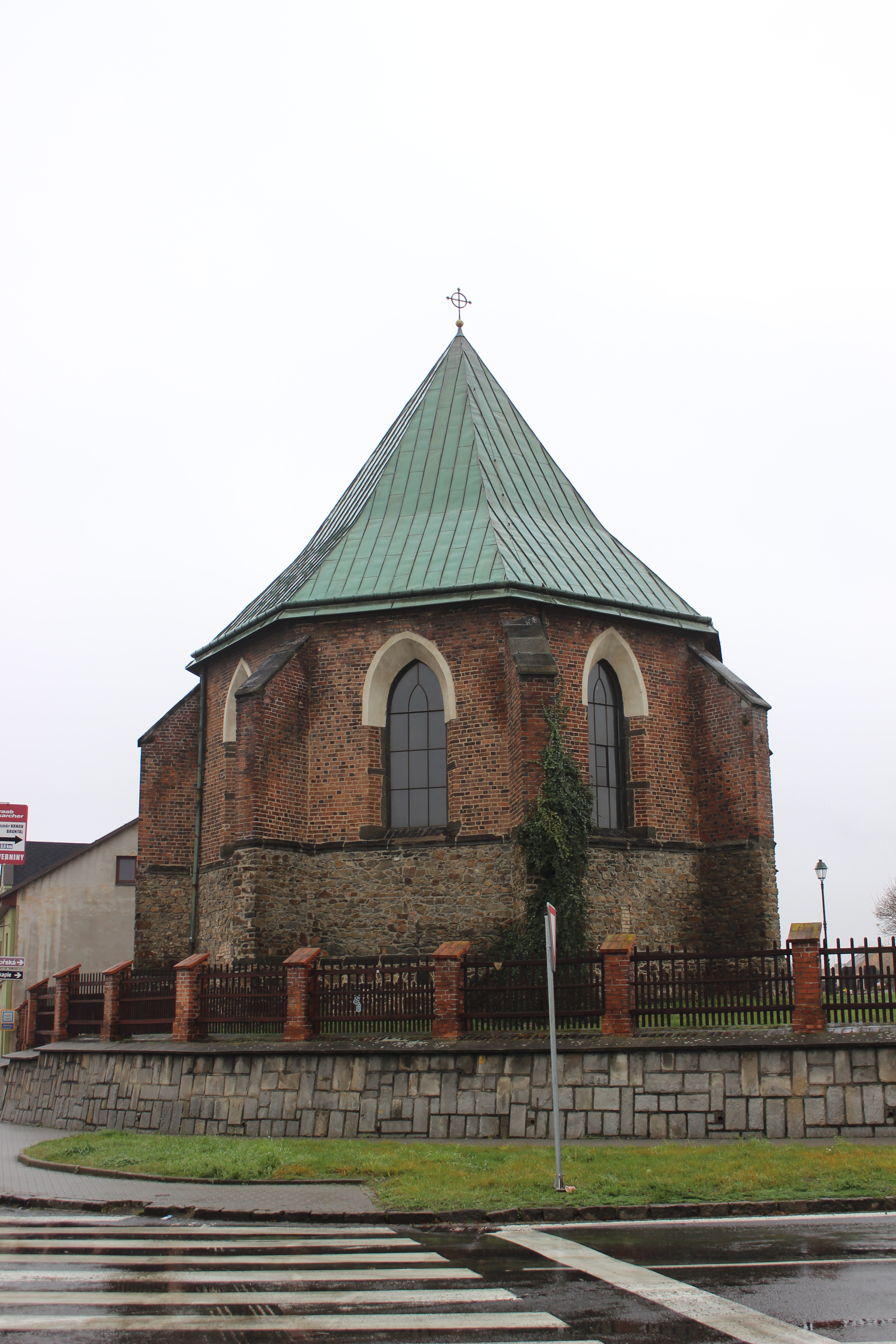 Opavská kaple svatého Kříže.